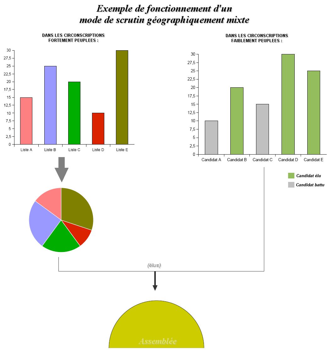 Schema d'un mode de fonctionnement de scrutin geographiquement mixte